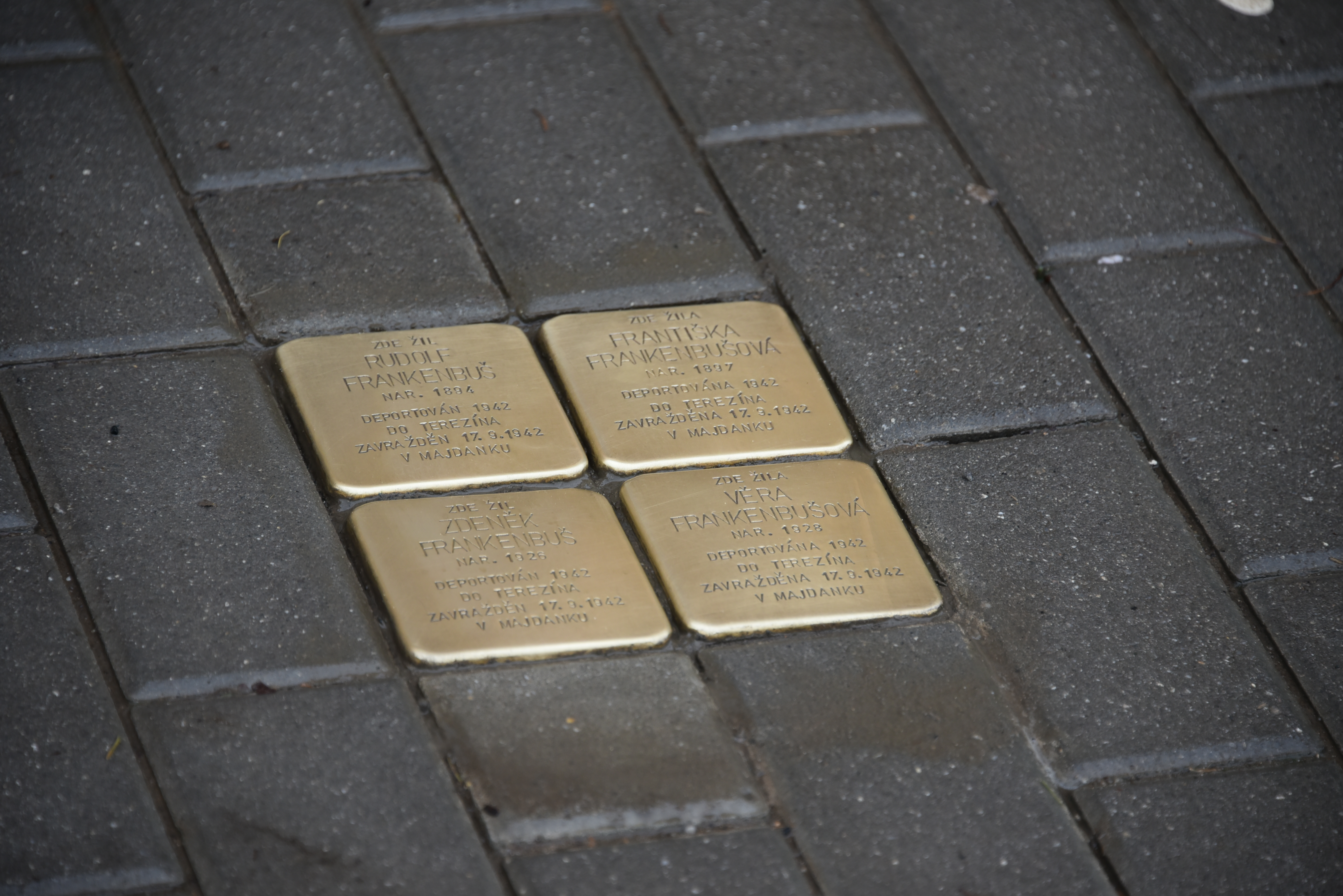 Stolpersteine Familie Frankenbus